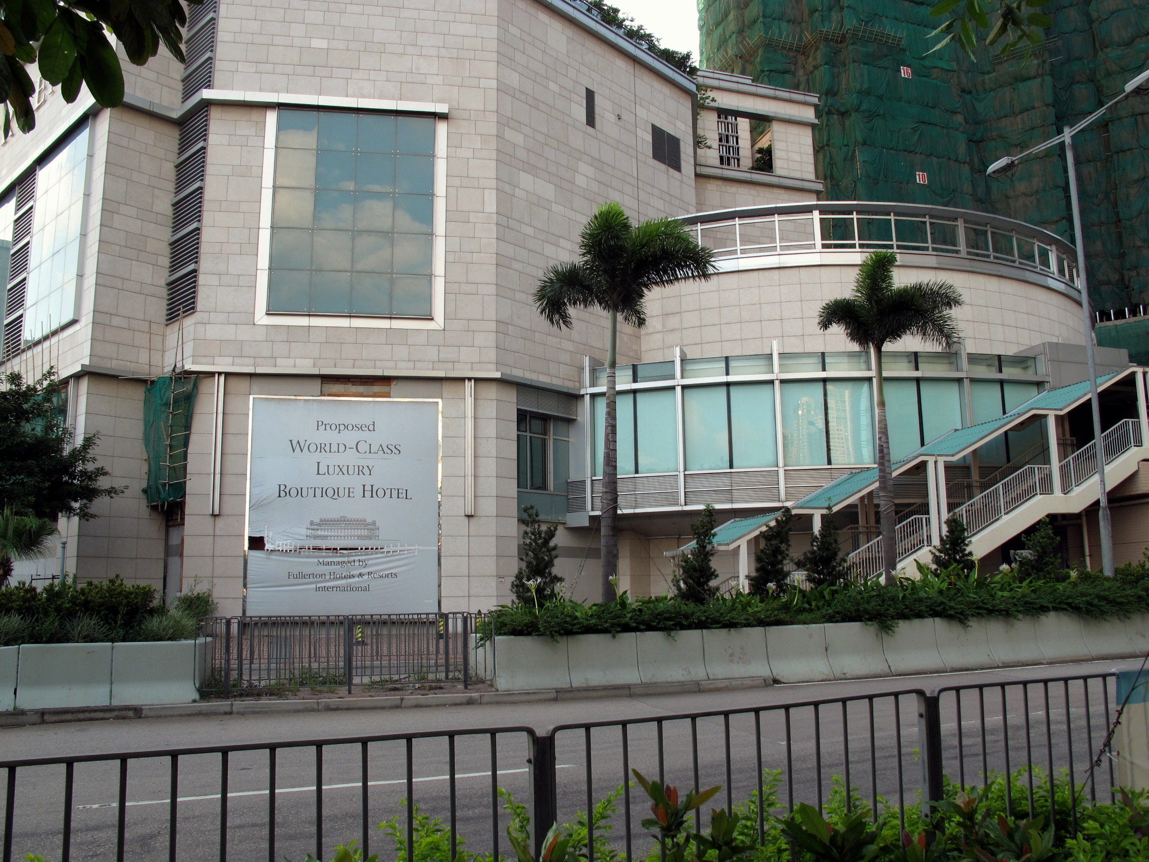 One Silver Sea Hotel Site